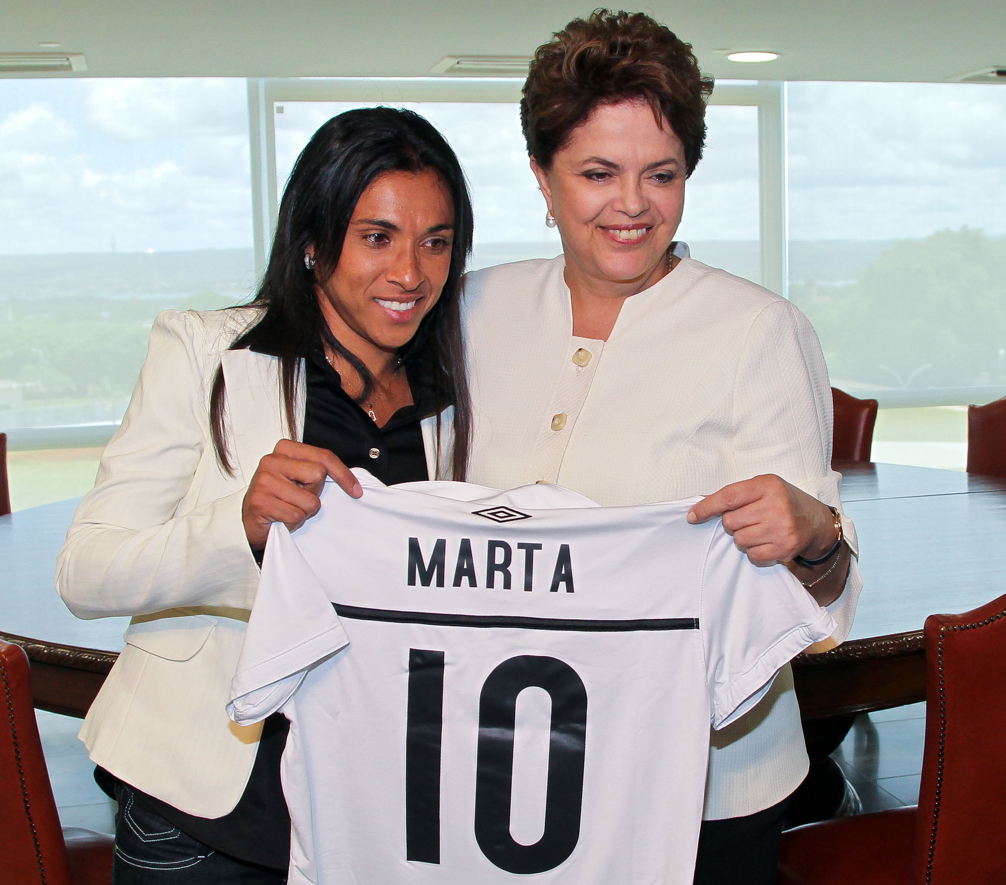 Presidenta Dilma Rousseff recebe camisa autografada pela jogadora de futebol Marta, durante encontro no Palácio do Planalto (Brasília, DF, 24/01/2011) Foto: Roberto Stuckert Filho/PR